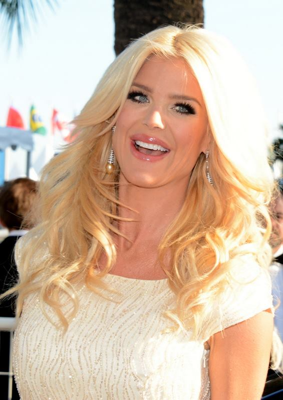 Victoria Silvstedt au festival de Cannes